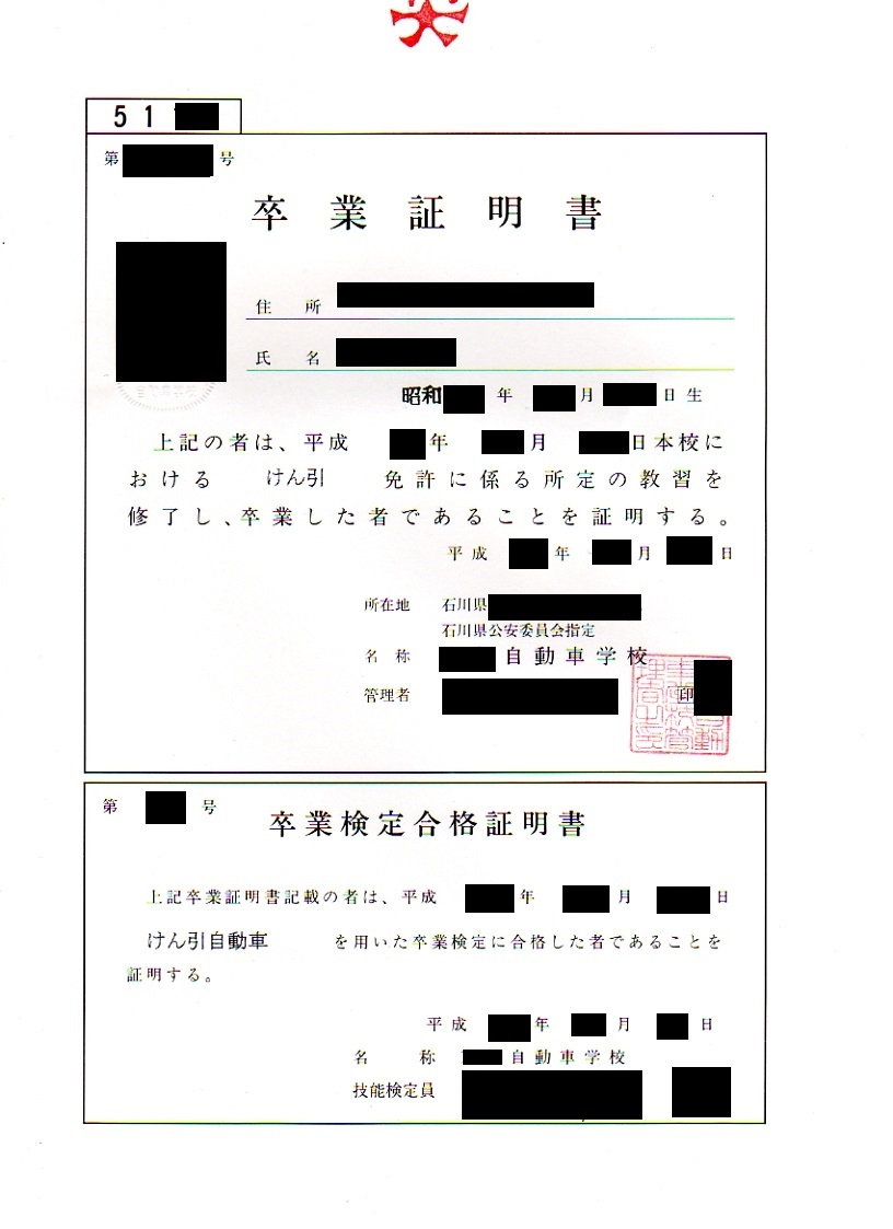 卒業証明書（けん引免許）